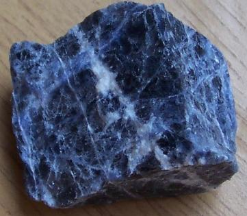 minerał; sodalit, pochodzenie Brazylia, autor zdjęcia Sebastian Socha; 05.08.2006r.